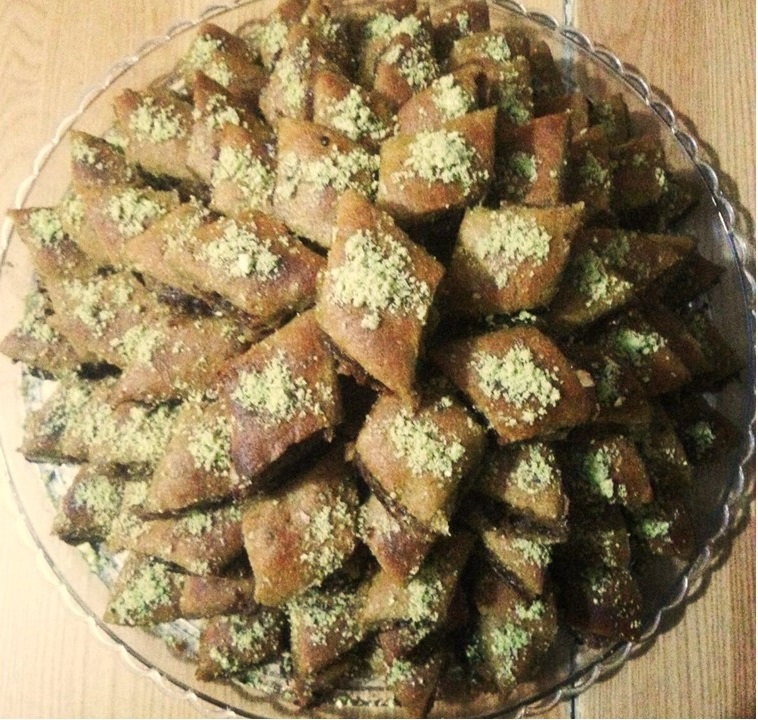 کماچ سهن